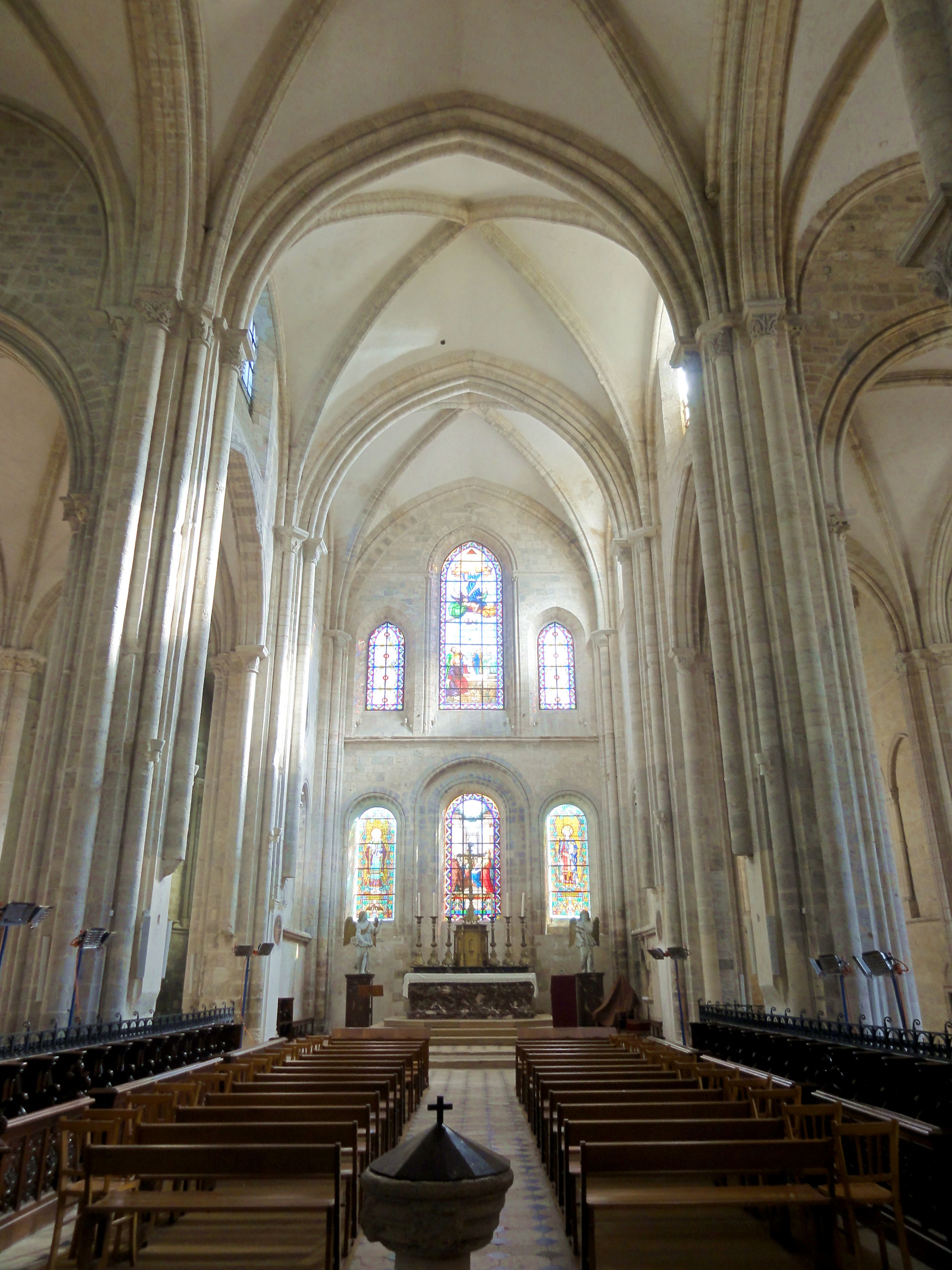 Chœur, 1ère travée, vue vers l'est.